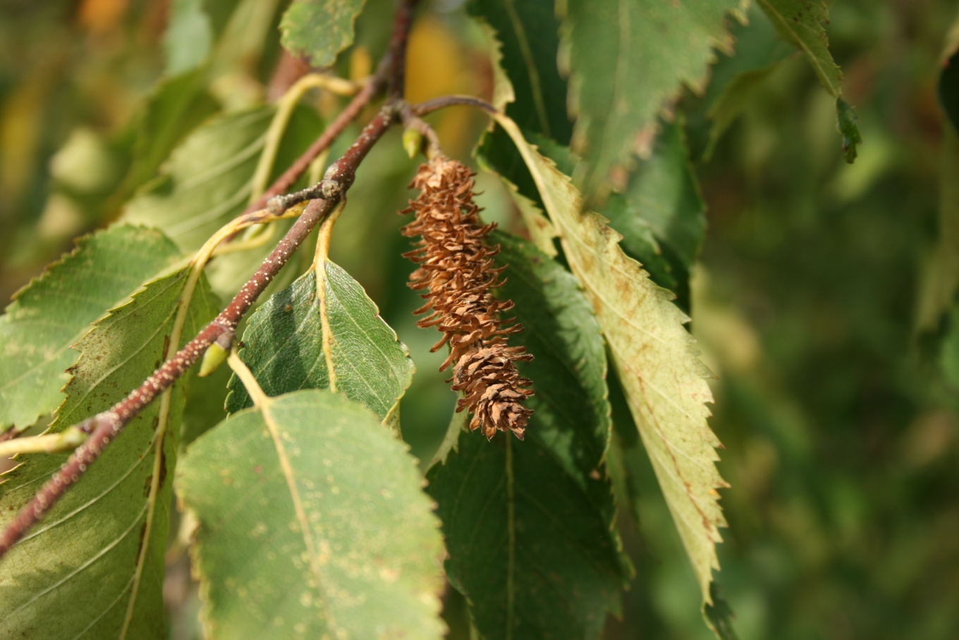 Betula albosinensis: Fruit.